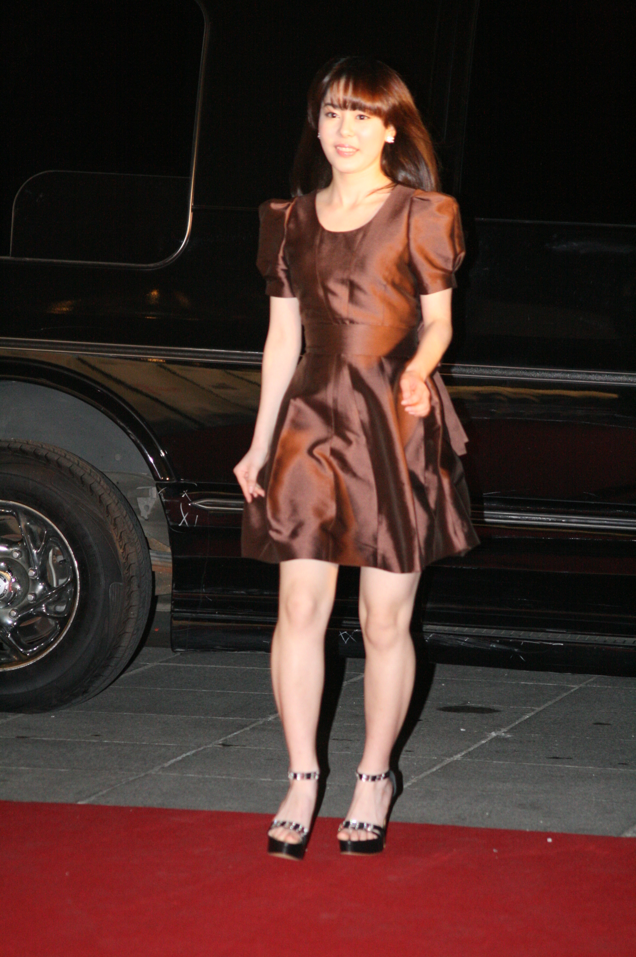 2010 멜론 뮤직 어워드